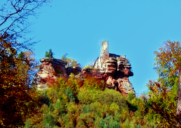 Burgruine Lützelhard Eigene Fotografie Herbst 2005